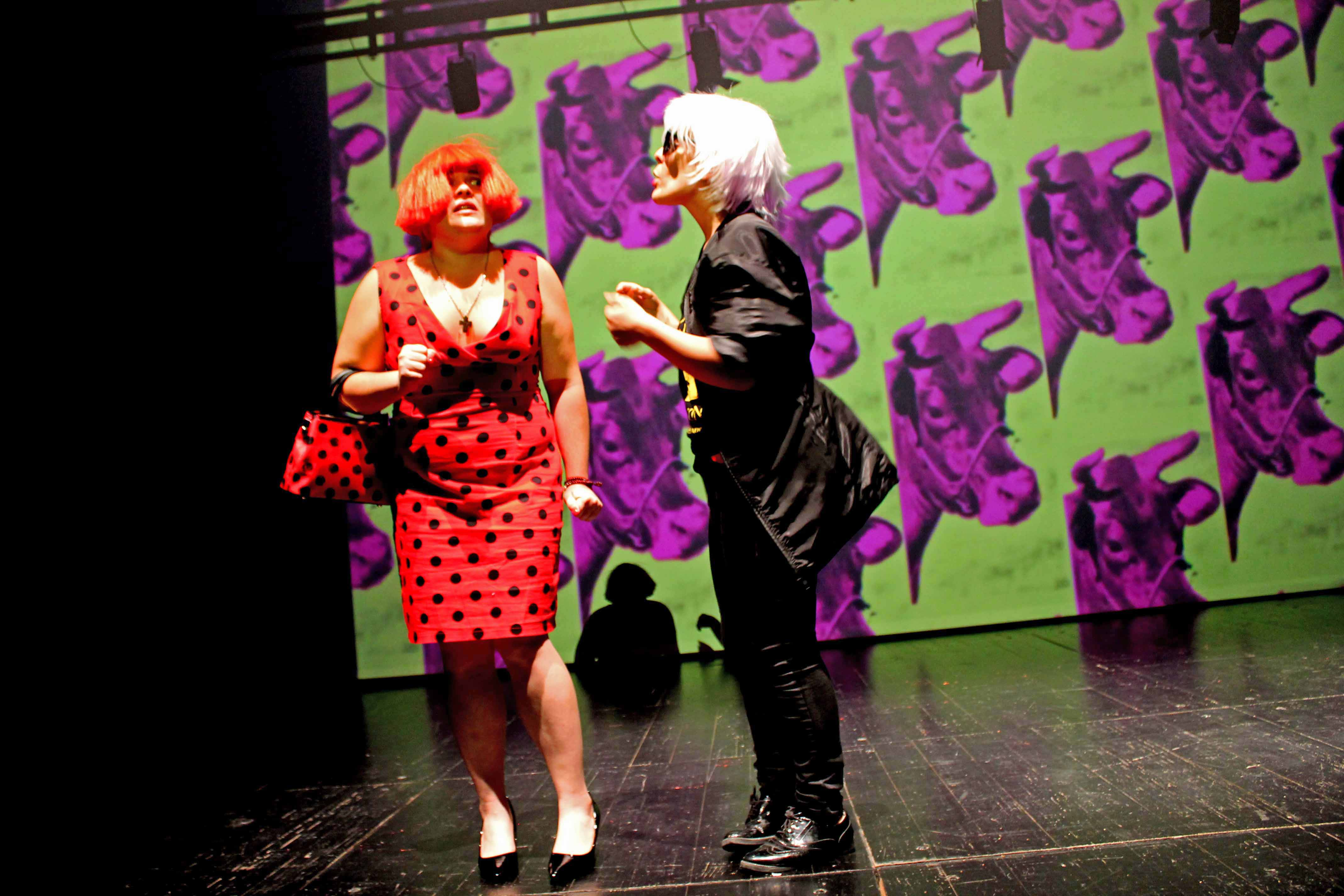 Fotografia do espectáculo Kusama e Warhol: o maior roubo da pop, das produções D. Mona.